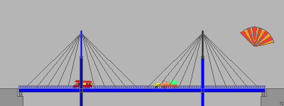 Schrägseilbrücke Fächerförmig